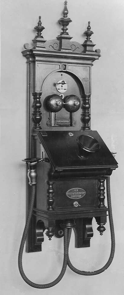 Wandapparat 1890, Postmuseum 1941